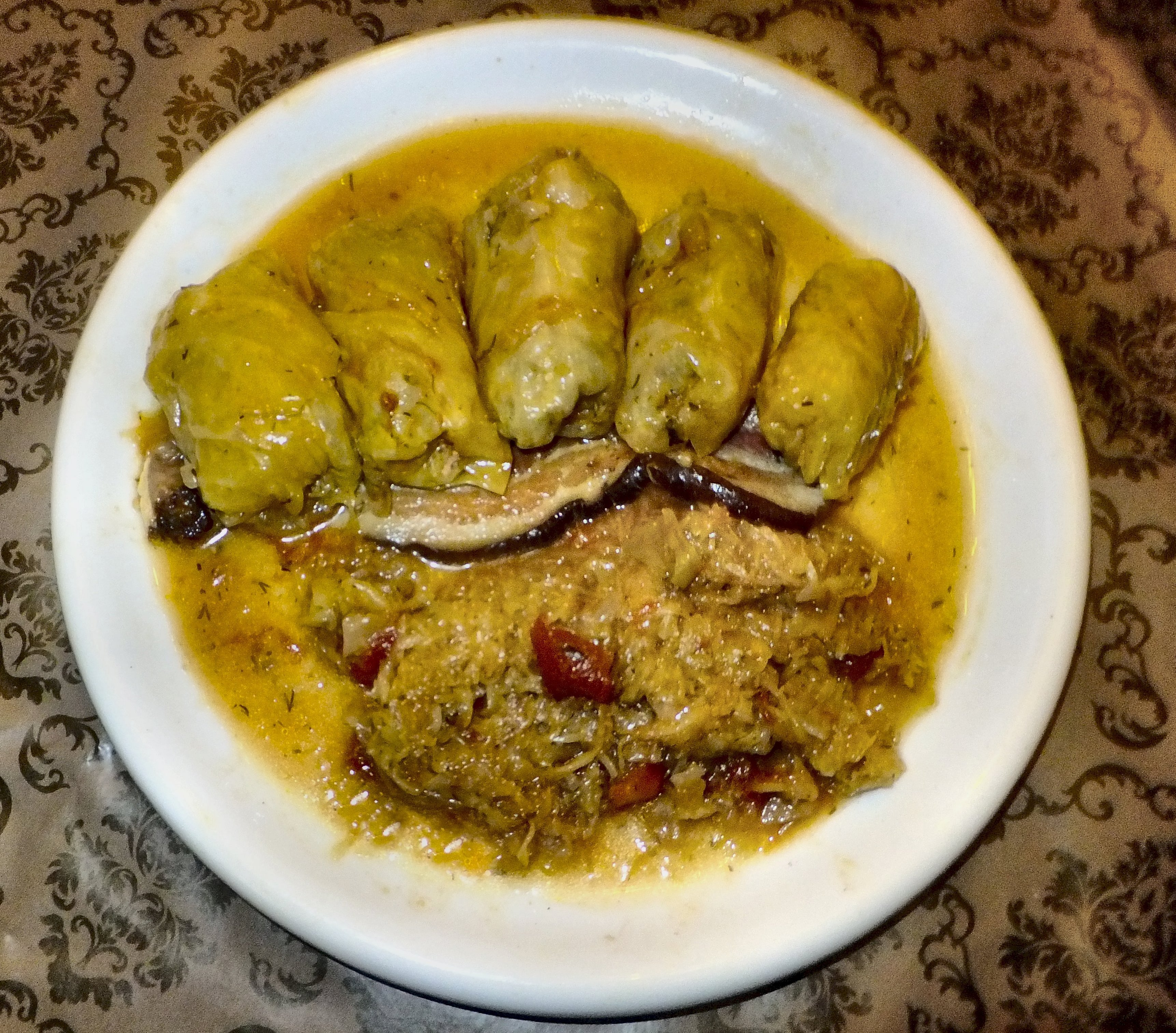 Sarmale de varză acră (Sauerkrautrouladen)